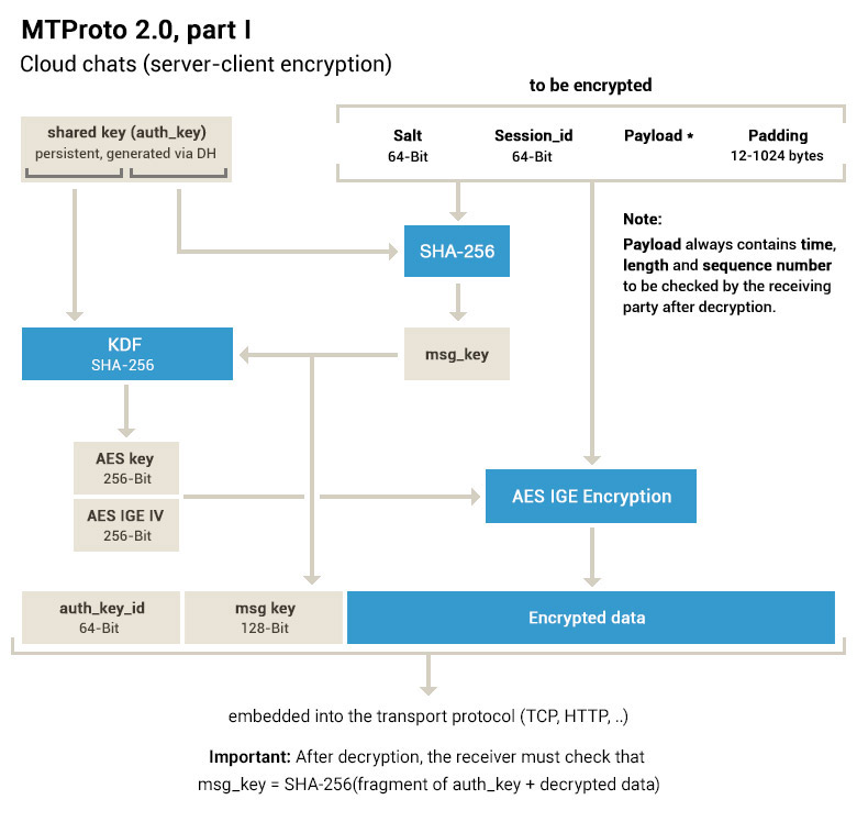 Esquema sobre el cifrado en chats normales